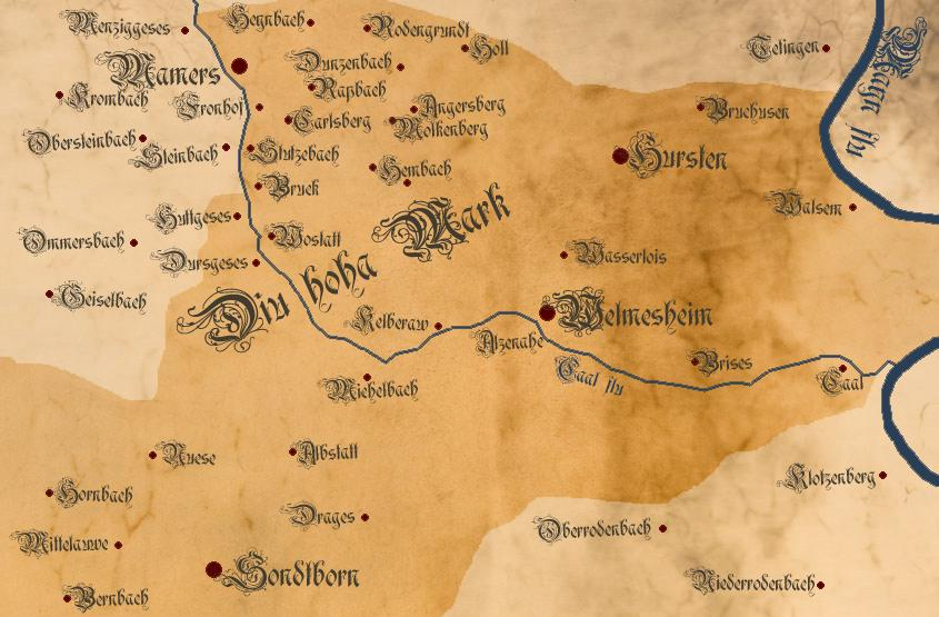 Das Territorium des Freigerichts Wilmundsheim vor der Hart im 16. Jahrhundert. Nachgezeichnet von einer Karte erstellt durch W.B.Kempf. Norden ist unten.